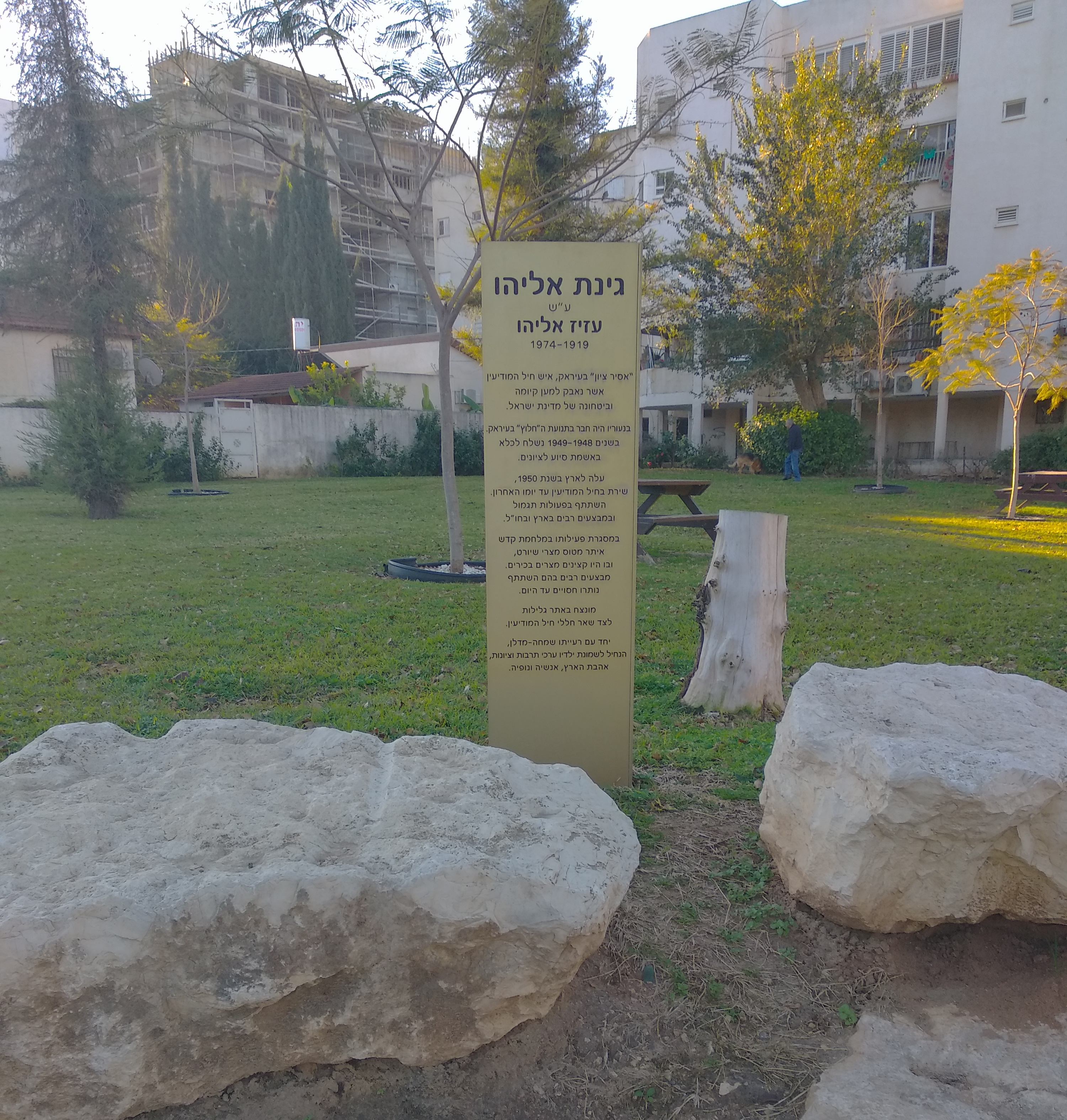 גינת אליהו ברחוב בר כוכבא פינת הגלבוע בהרצליה